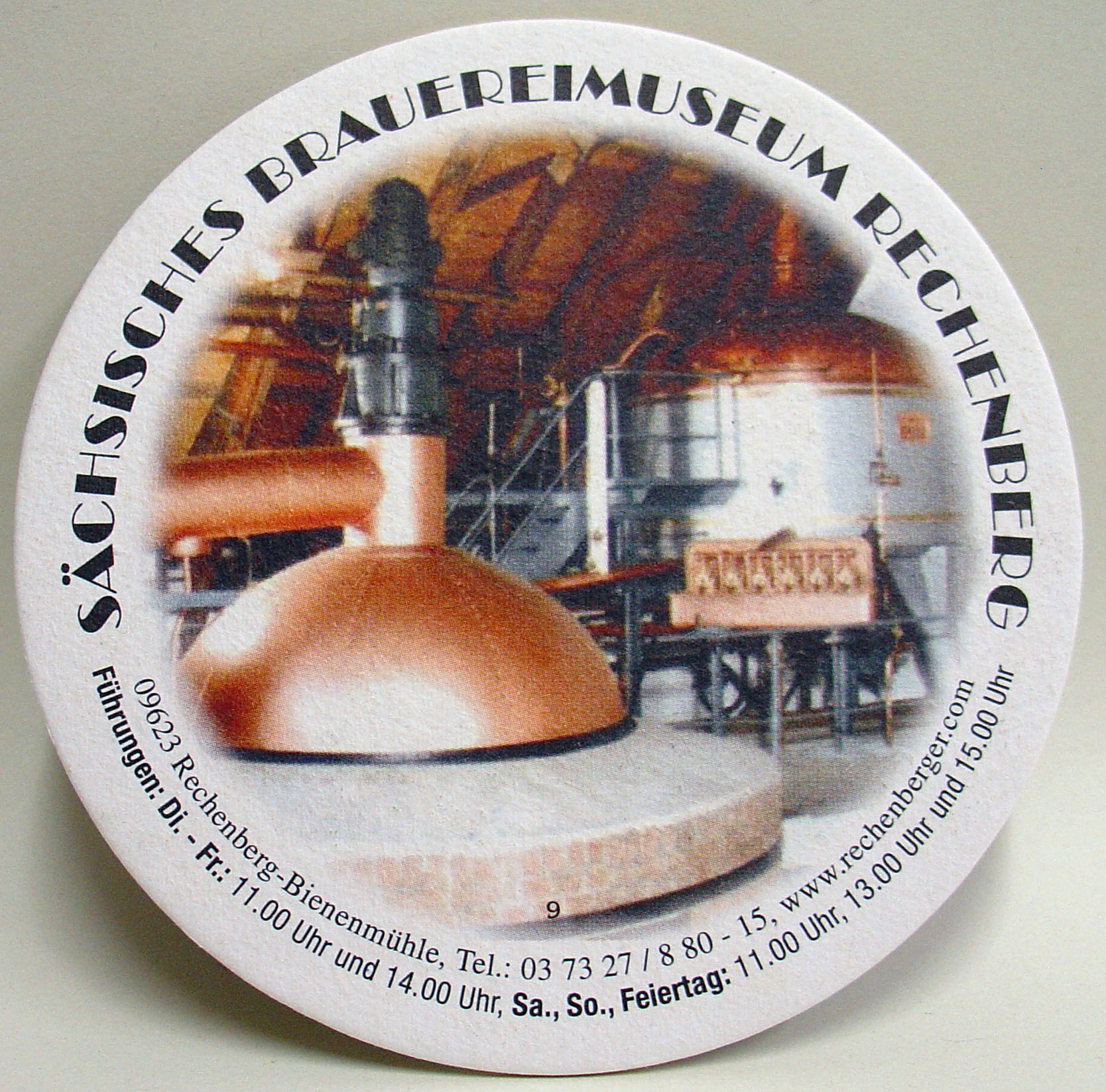 Bierdeckel des Rechenberger Bieres aus der Privaten Traditionsbrauerei Meyer